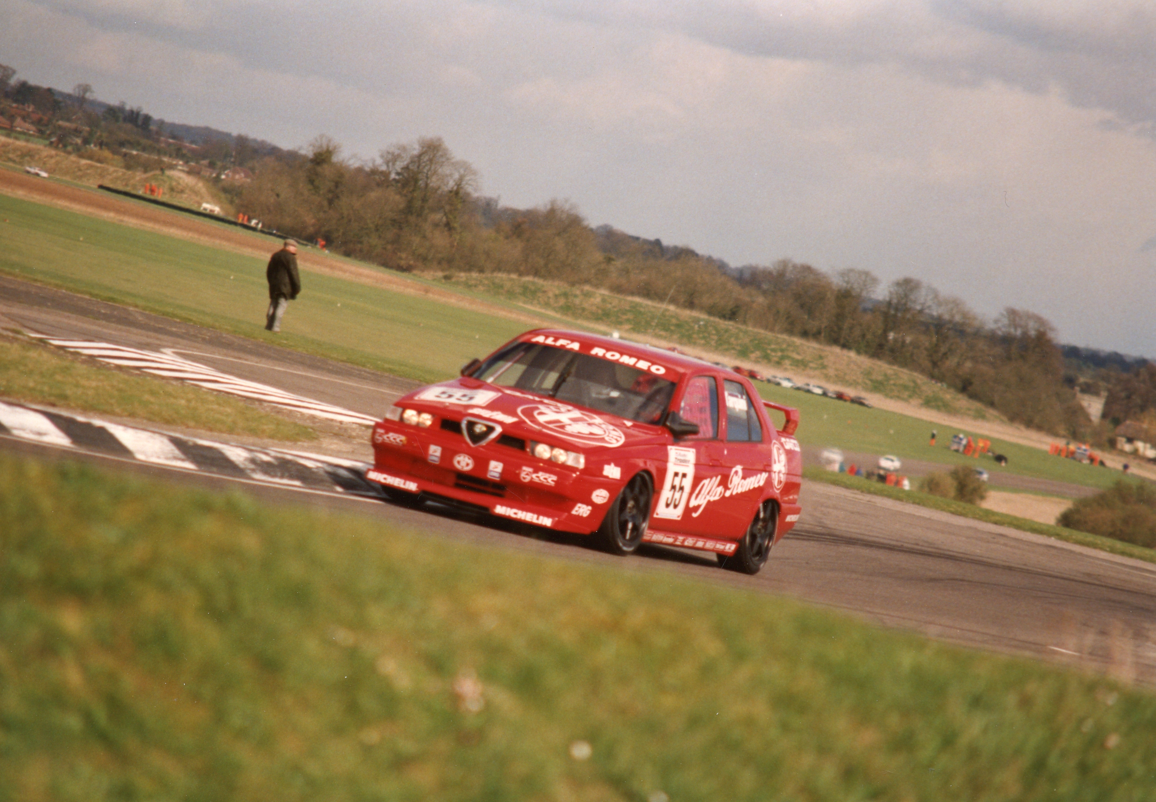 Gabriele Tarquini BTCC Truxton 4th April 1994